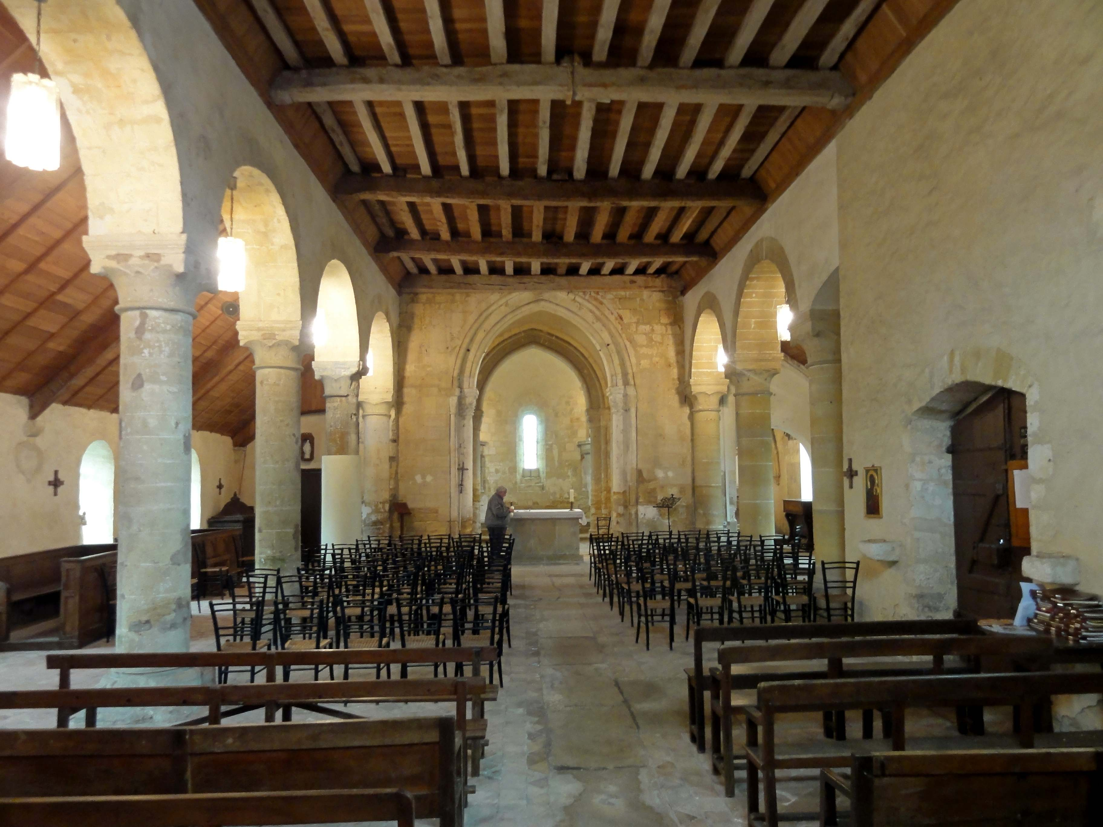 Intérieur de l'église - voir titre.